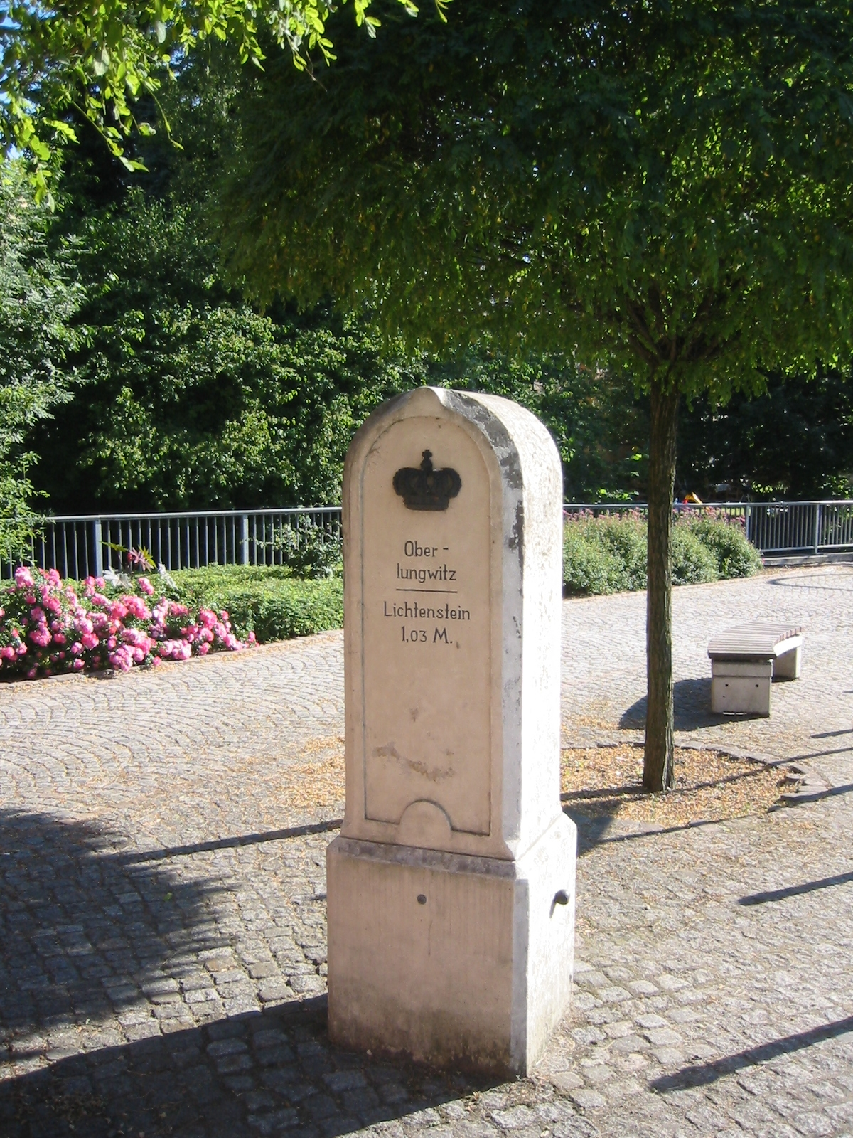 Postsäule in Oberlungwitz